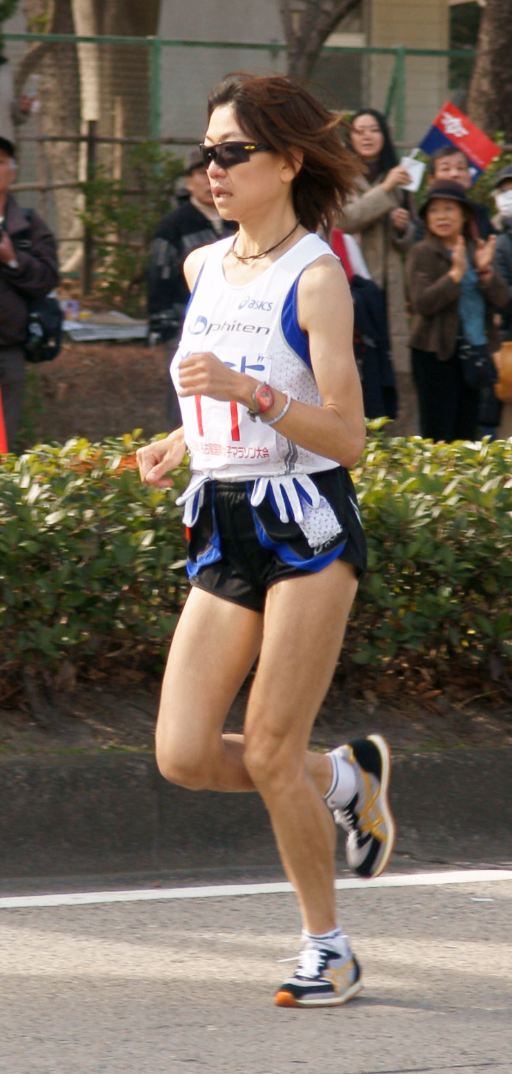 Takahashi Naoko, 2008 Nagoya Womens International Marathon